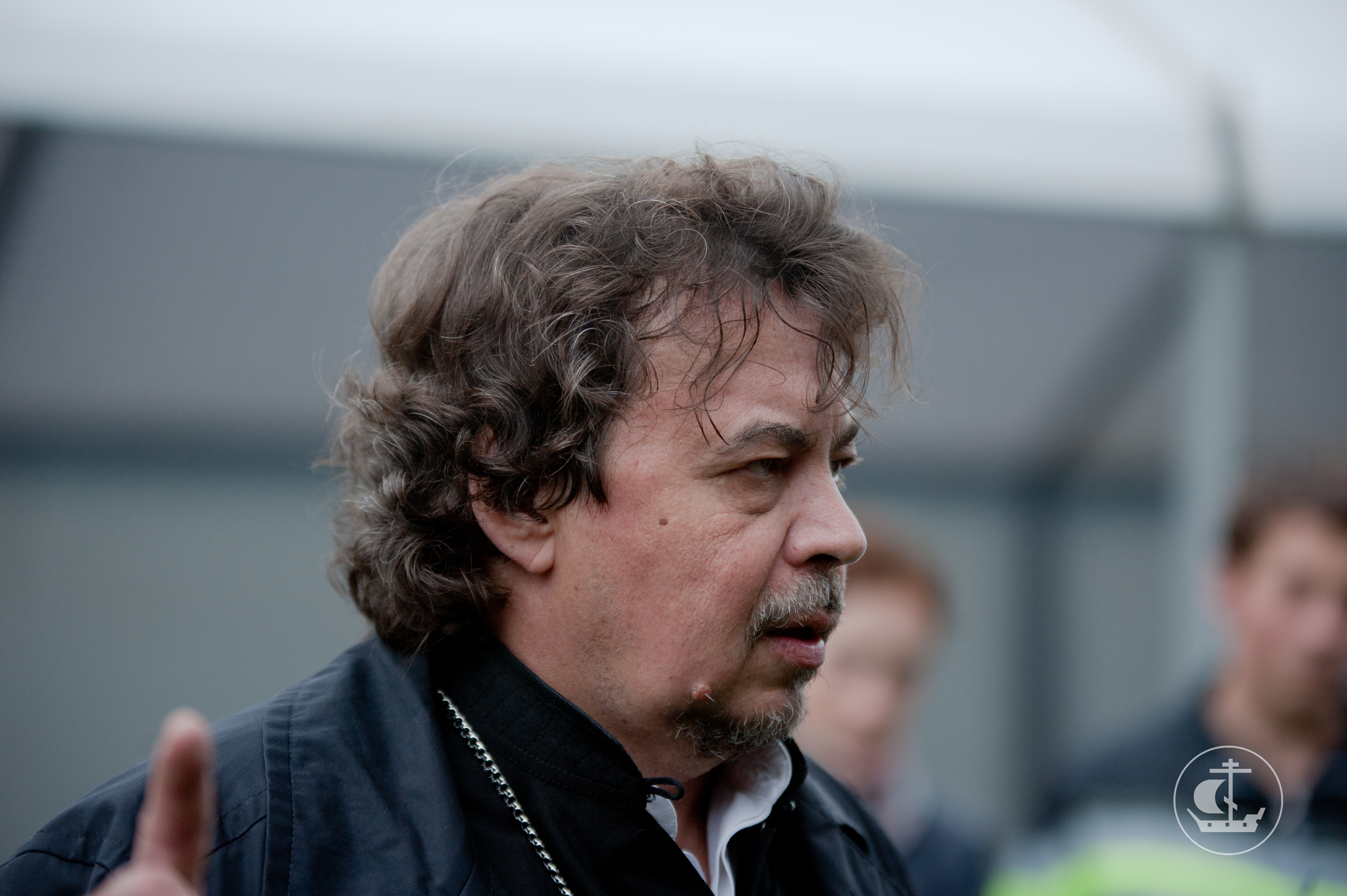 епископ Петергофский Маркелл